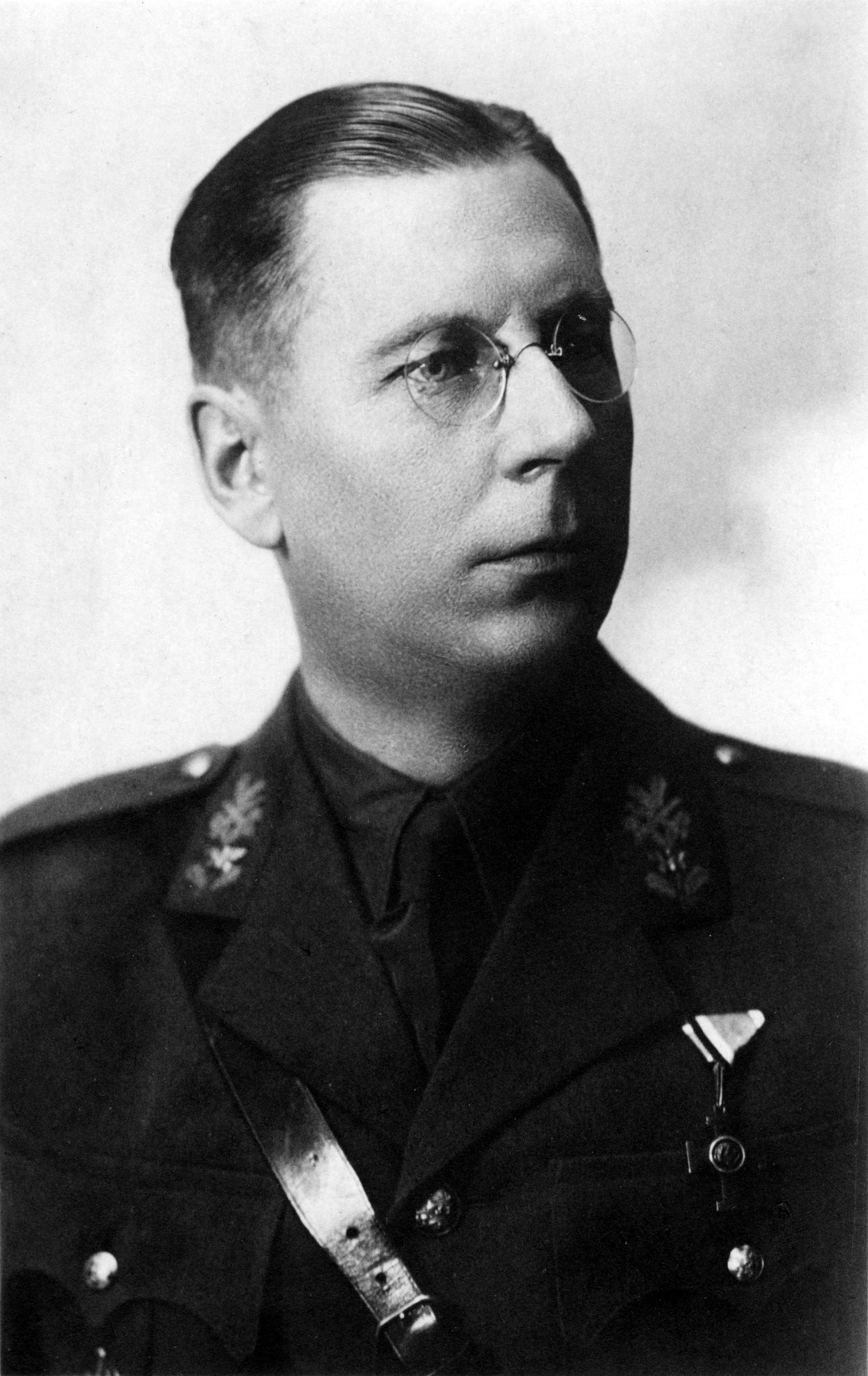 Kolonel Voldemar Koht (Koch) VR II/3.